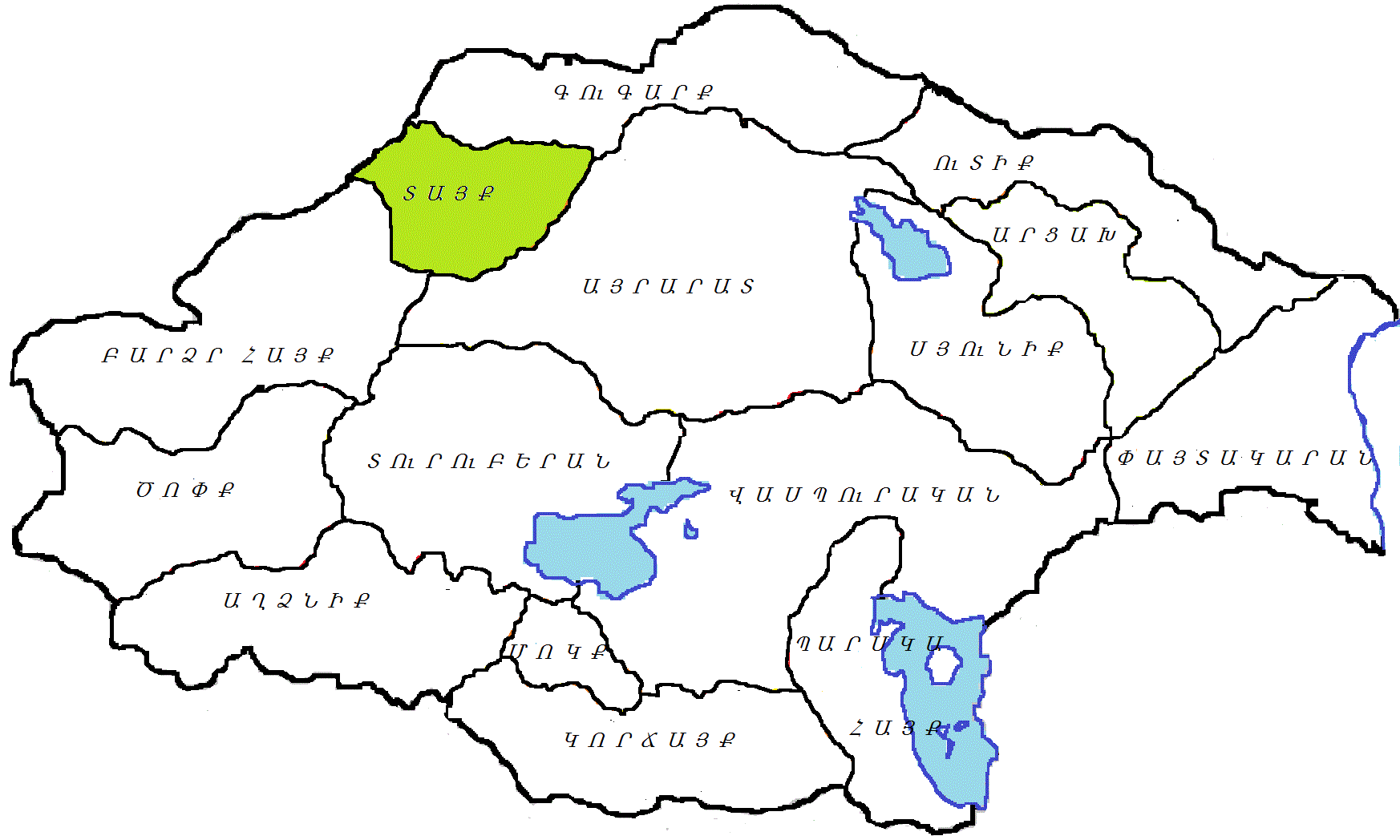 Տայք, Մեծ Հայք